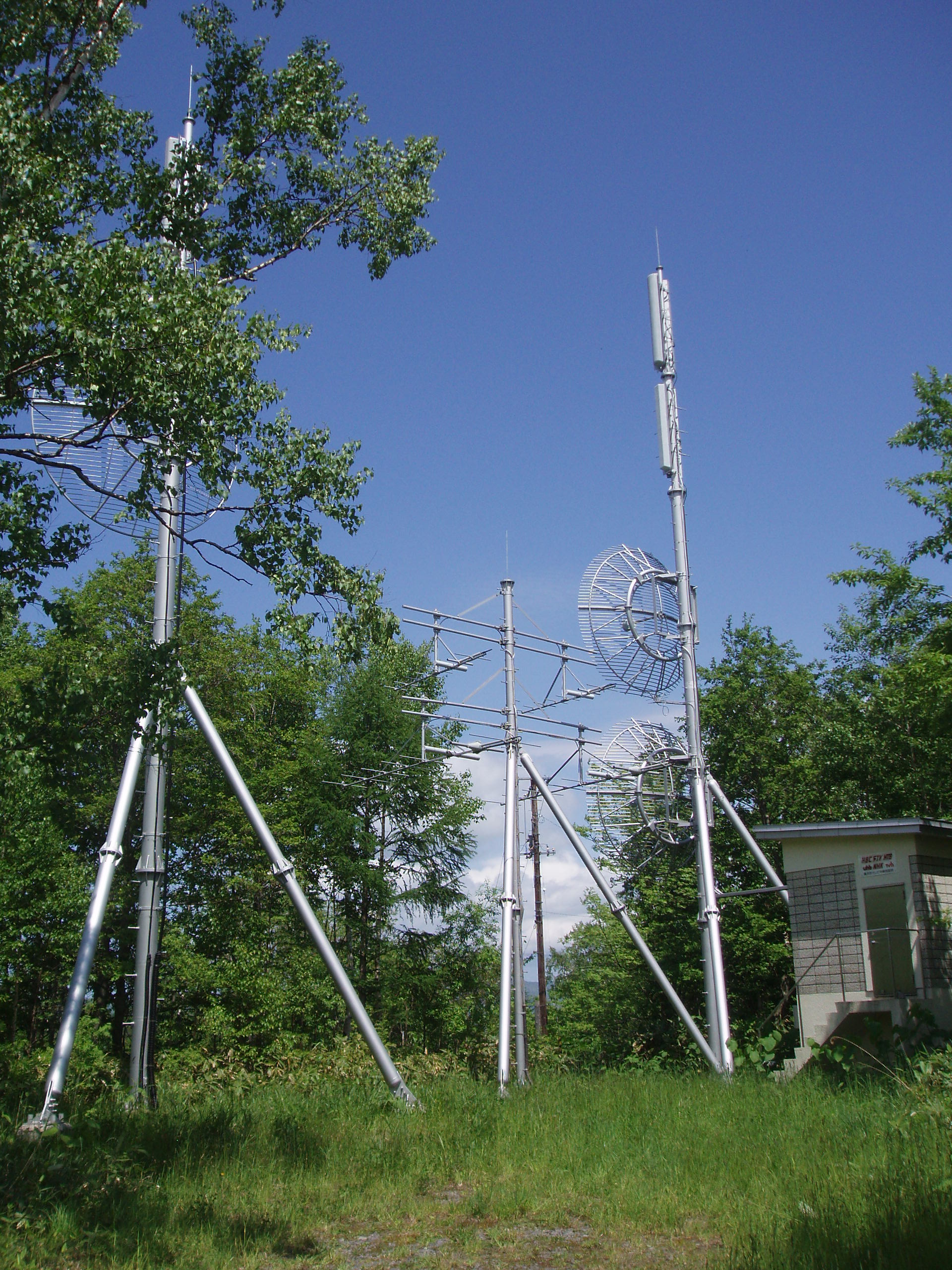 喜茂別中継局 NHK・HBC・STV・HTB・UHB・TVh送信設備